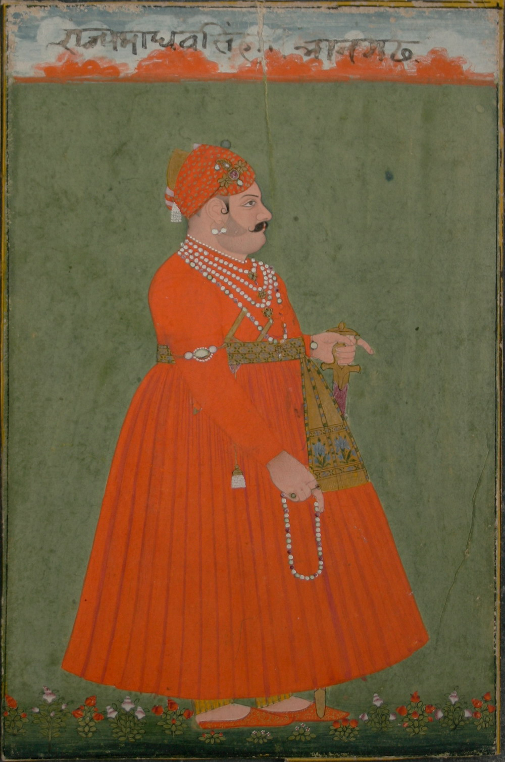 Rajasthan, Jaipur Sawai Madho Singh Circa 1750 16.3 x 10.5cm Price: £2500